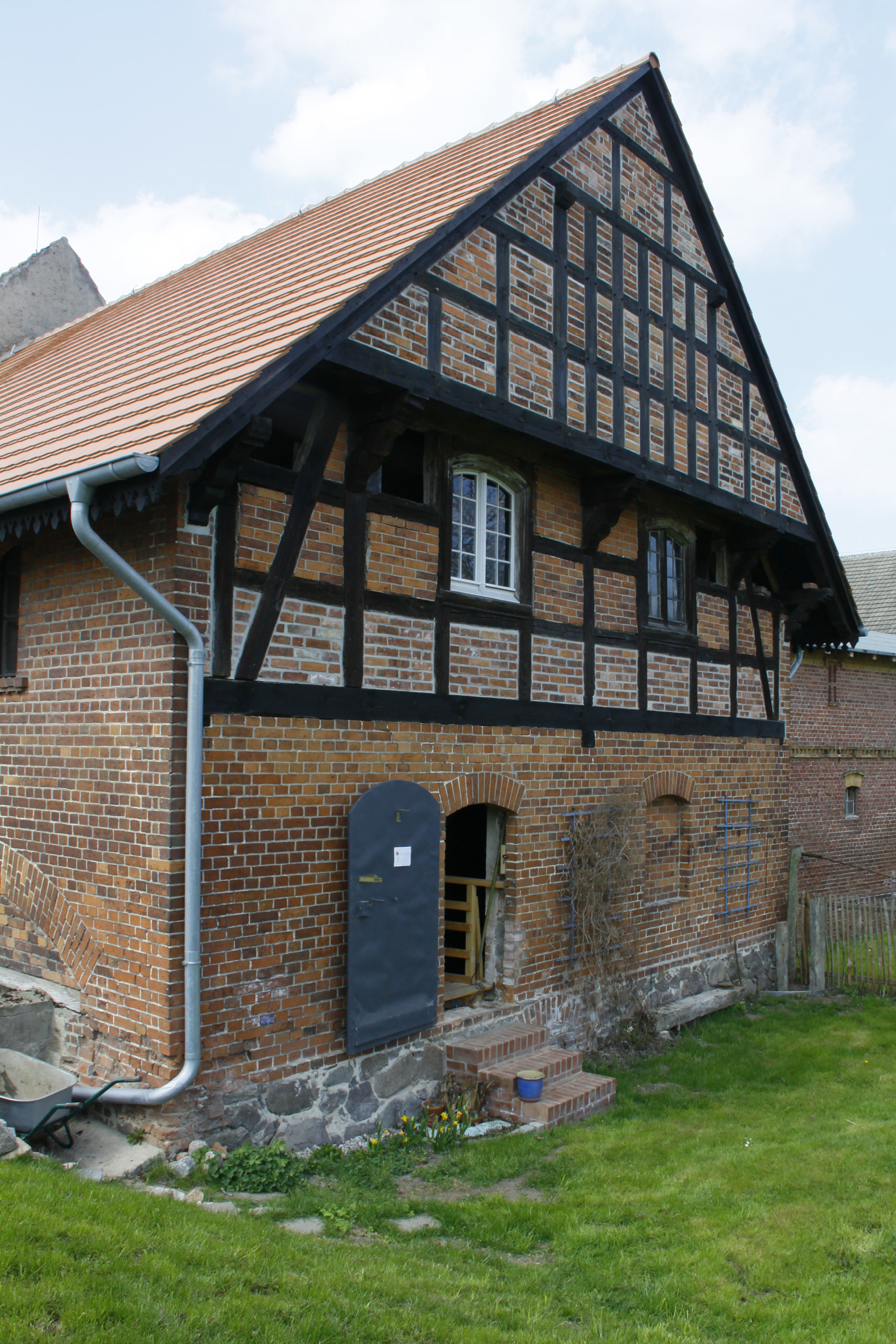 OT Bad Belzig, am Ortseingang, in der Sanierung, kann besichtigt werden (nach Anmeldung)